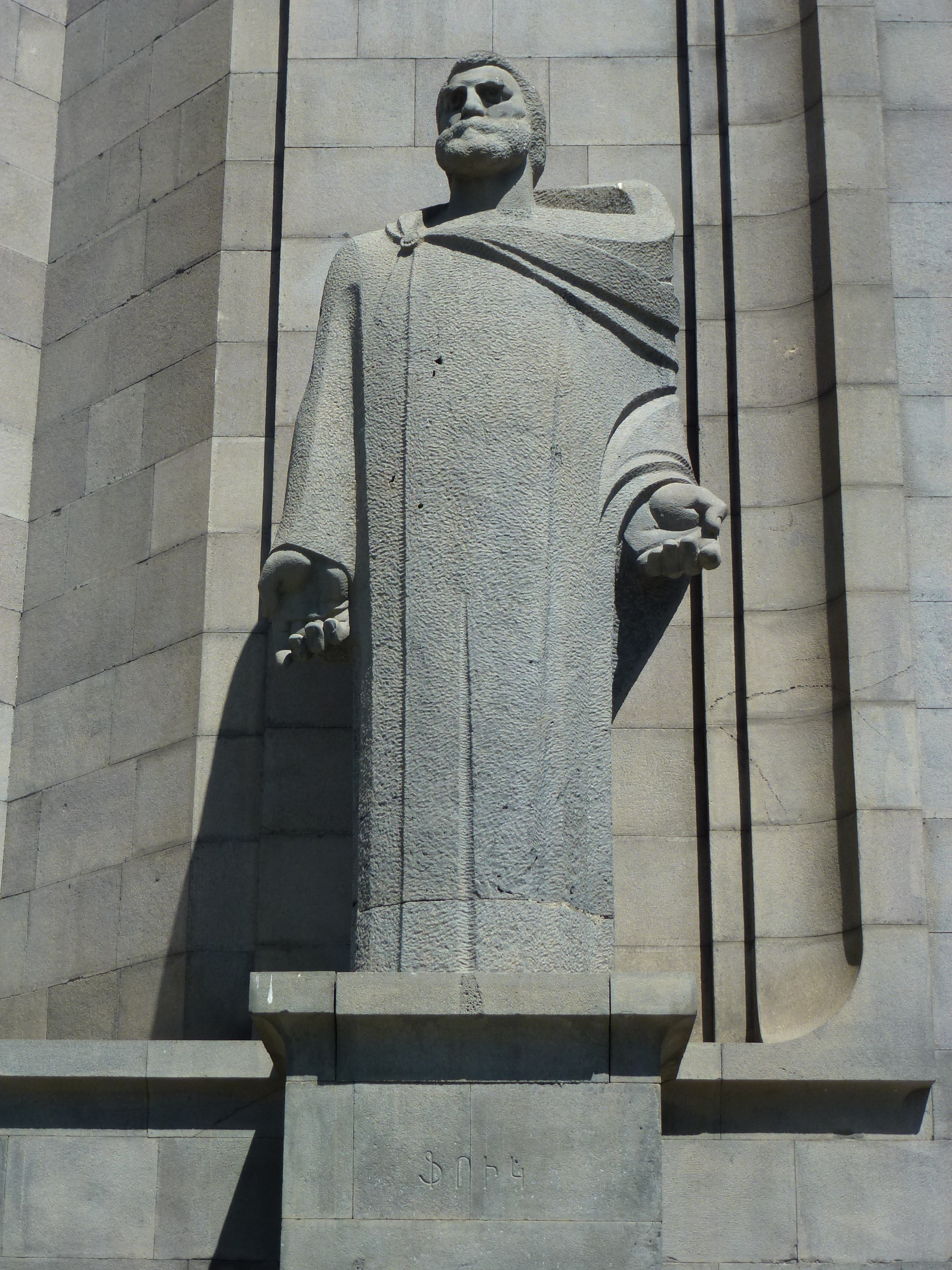 Ֆրիկի արձանը Մատենադարանում 6/81.9